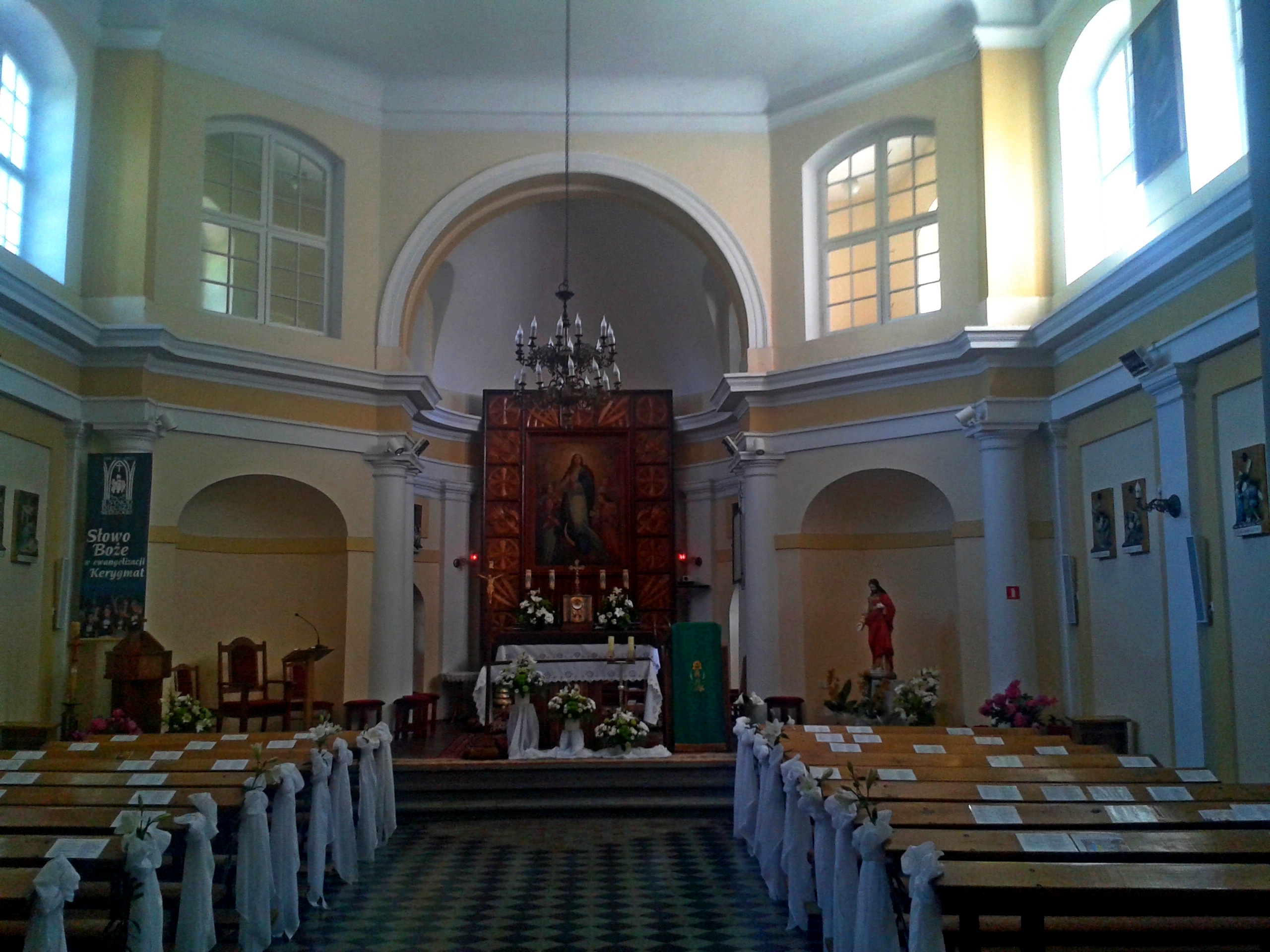 Wnętrze kościoła w Motwicy